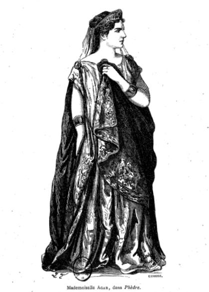 Mademoiselle Agar dans Phèdre